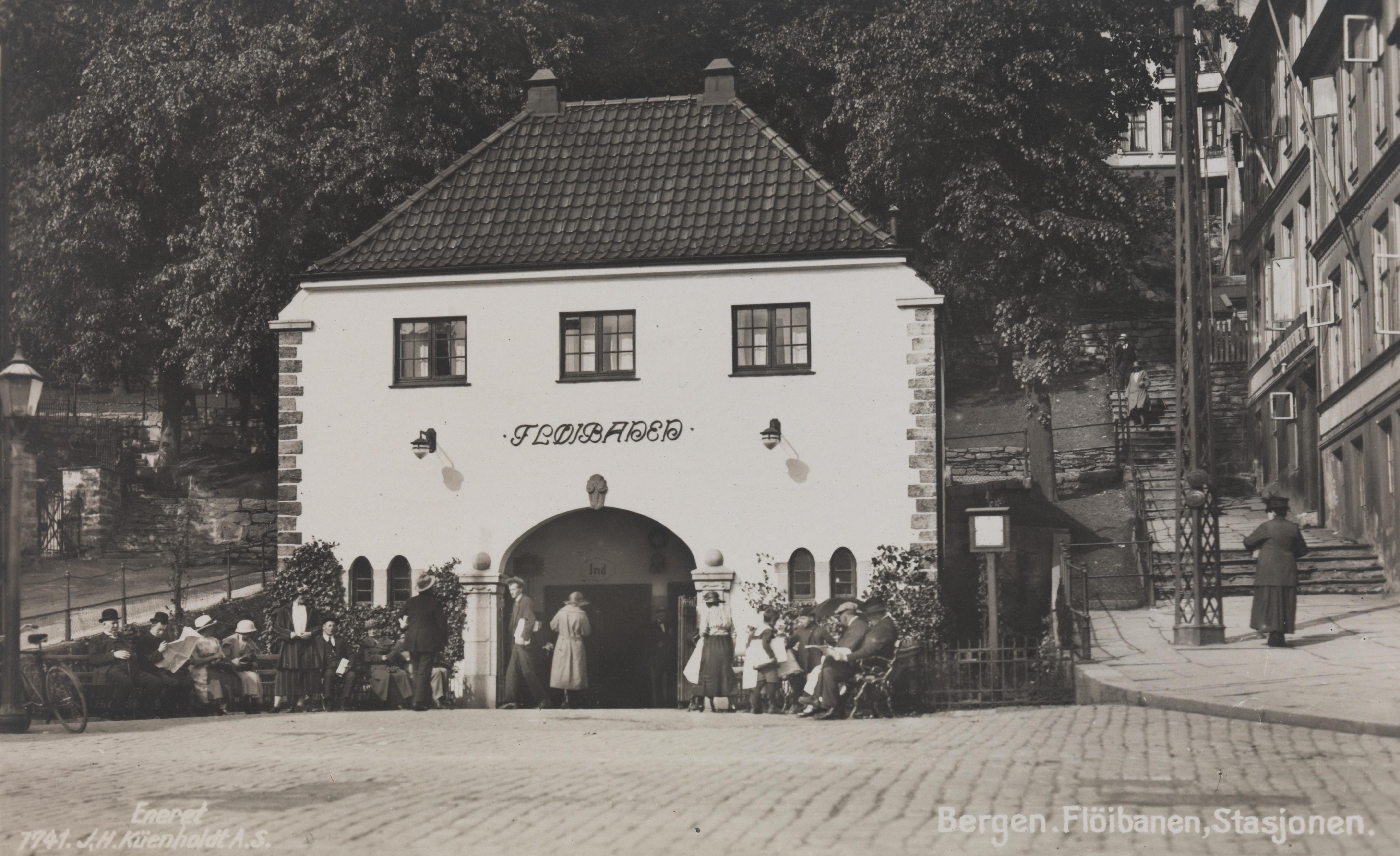 Bildet er hentet fra Nasjonalbibliotekets bildesamling Fløyen, Bergen, Hordaland